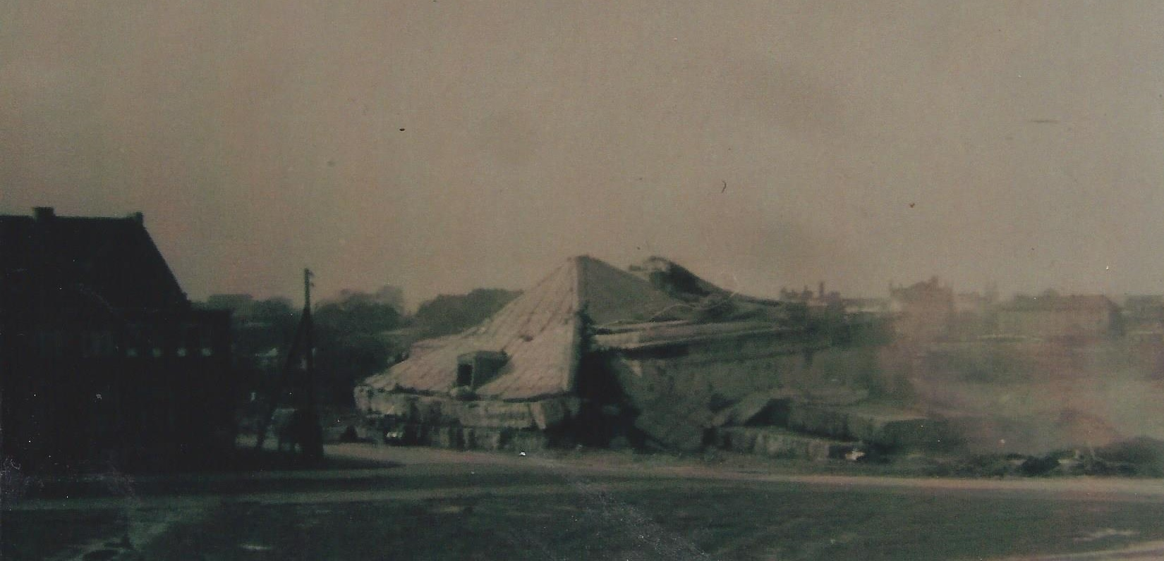 Sprengung eines Flakbunkers am Isländer Platz in Wesermünde (Bremerhaven-Geestemünde-Süd).